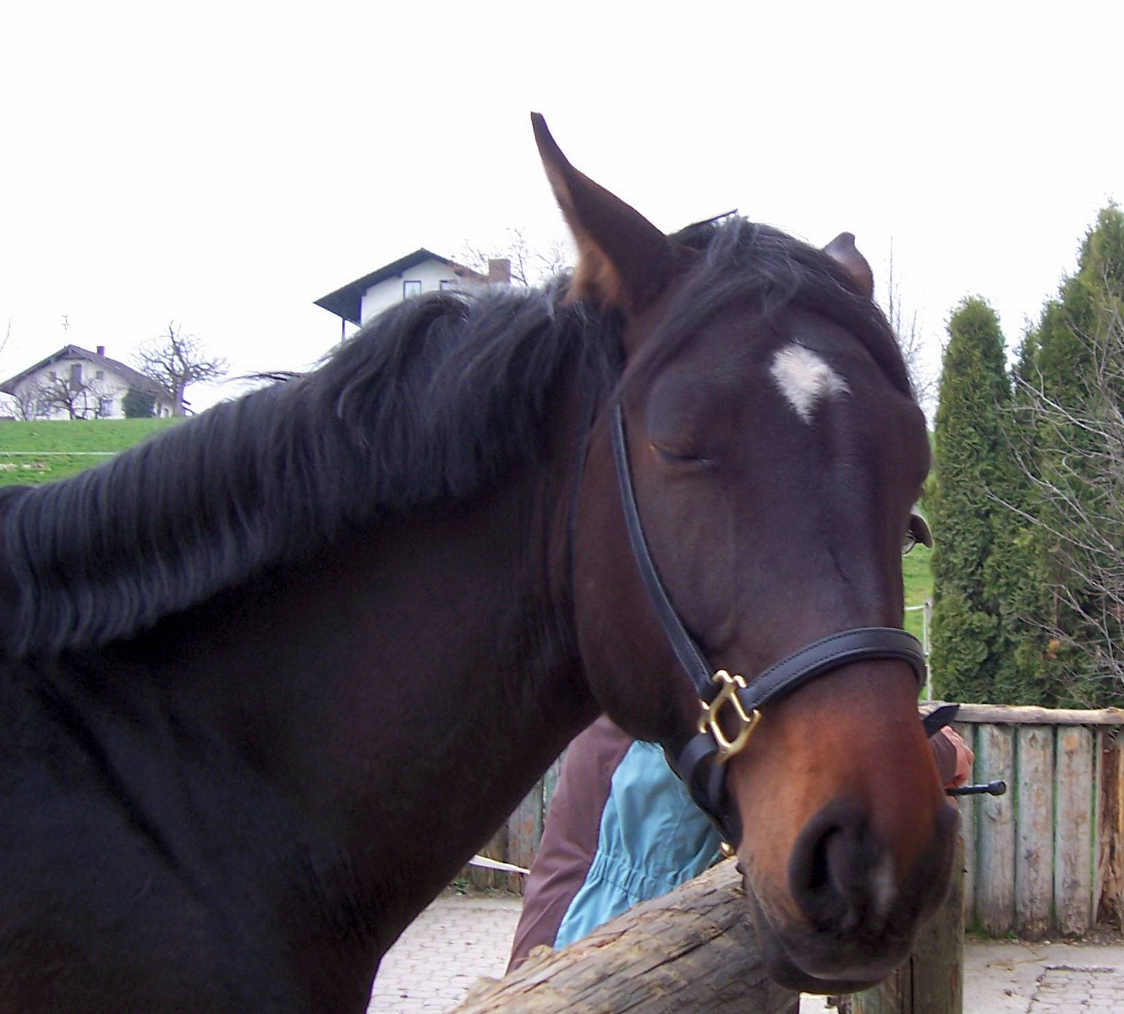 Horse